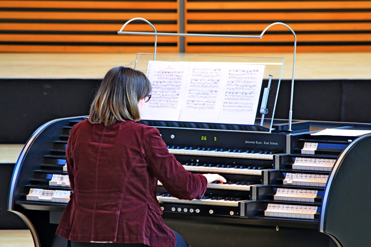 Die russische Organistin Natalia Uzhvi am Spieltisch der Orgel in der Konzertkirche Neubrandenburg